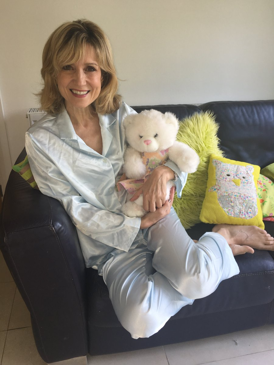 Y cyflwynydd a'r rhedwraig Angharad Mair yn cefnogi 'Parti Pyjamas Mwyaf y Byd'